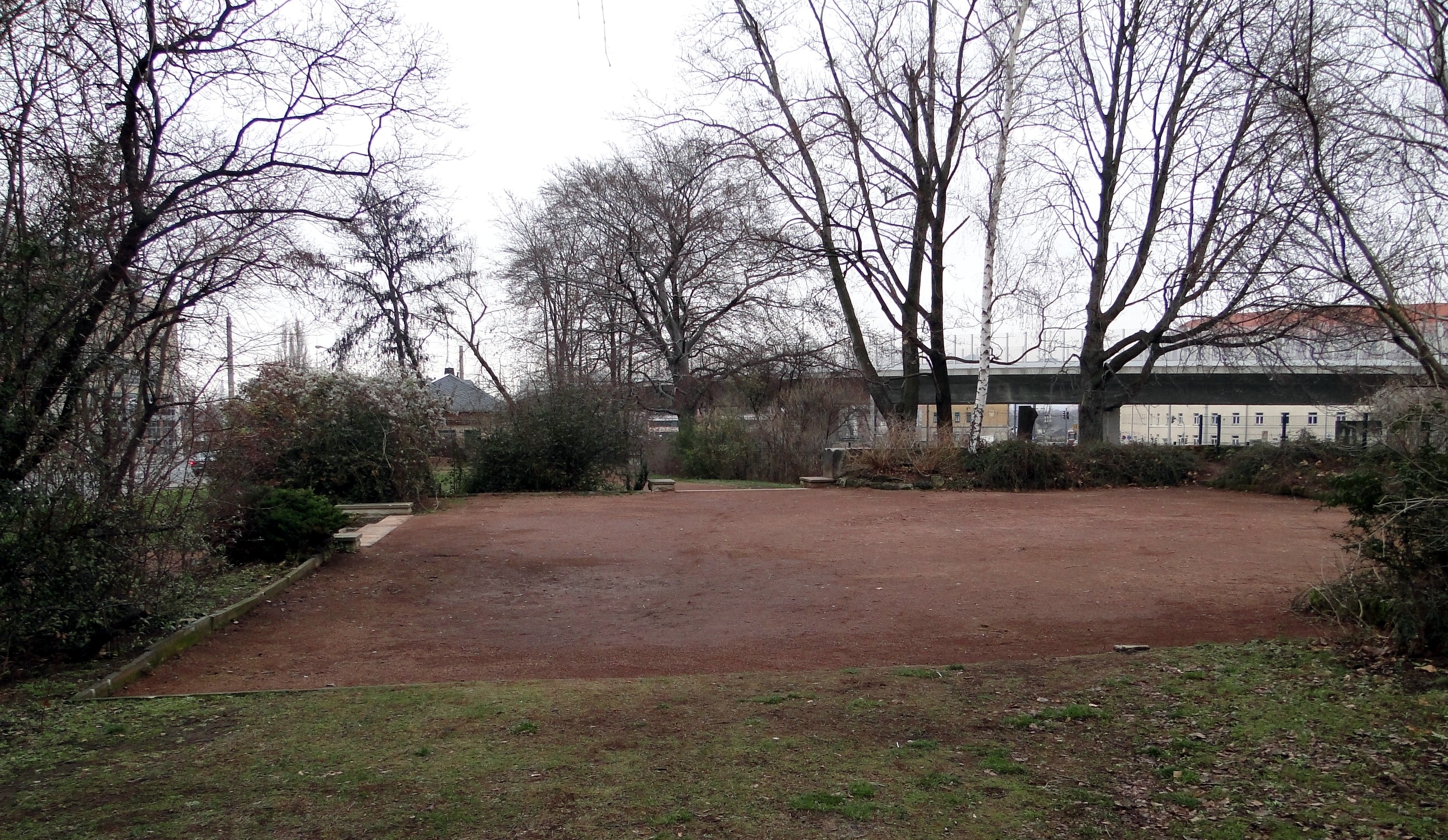 Standort des ehem. alten Rathauses Dresden-Löbtau 2009